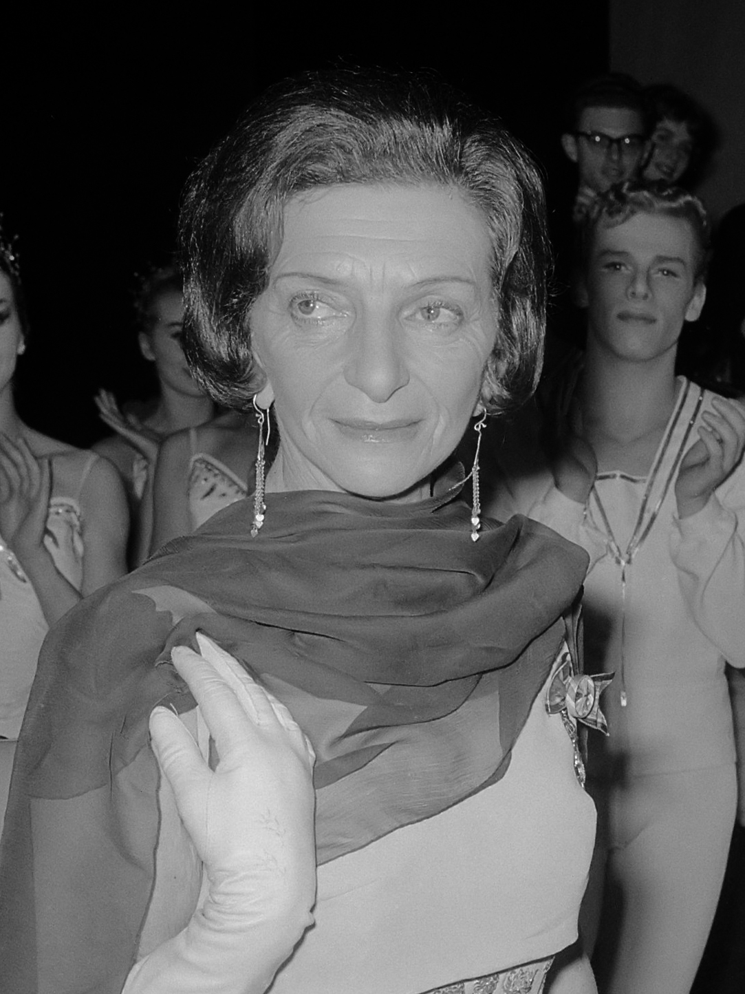 Sonja Gaskell officier, na de voorstelling ontving zij de versierselen van Minister Vrolijk 3 februari 1966